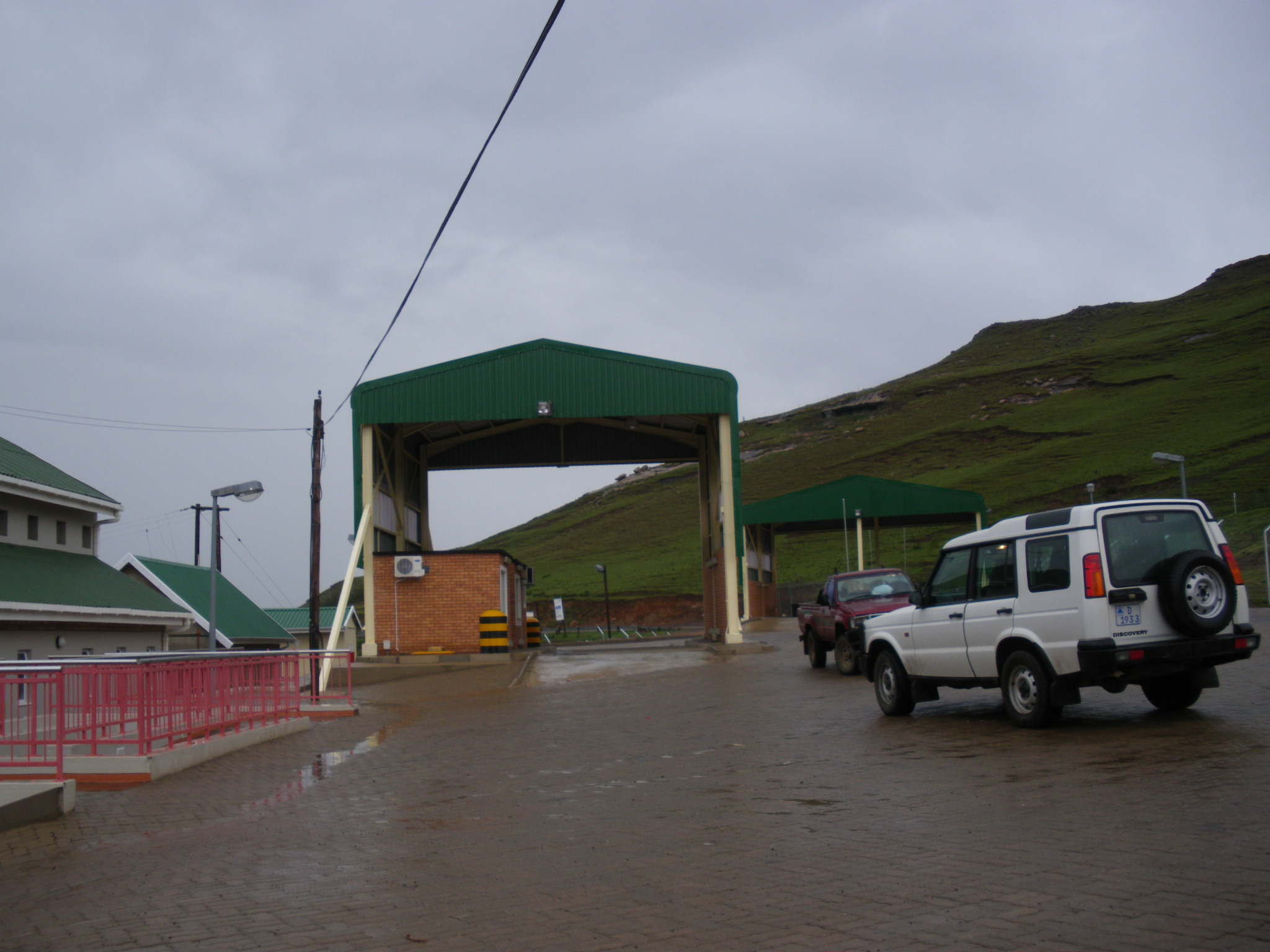 Col de montagne du Qacha's Pass entre le Lésotho et l'Afrique du Sud : check point